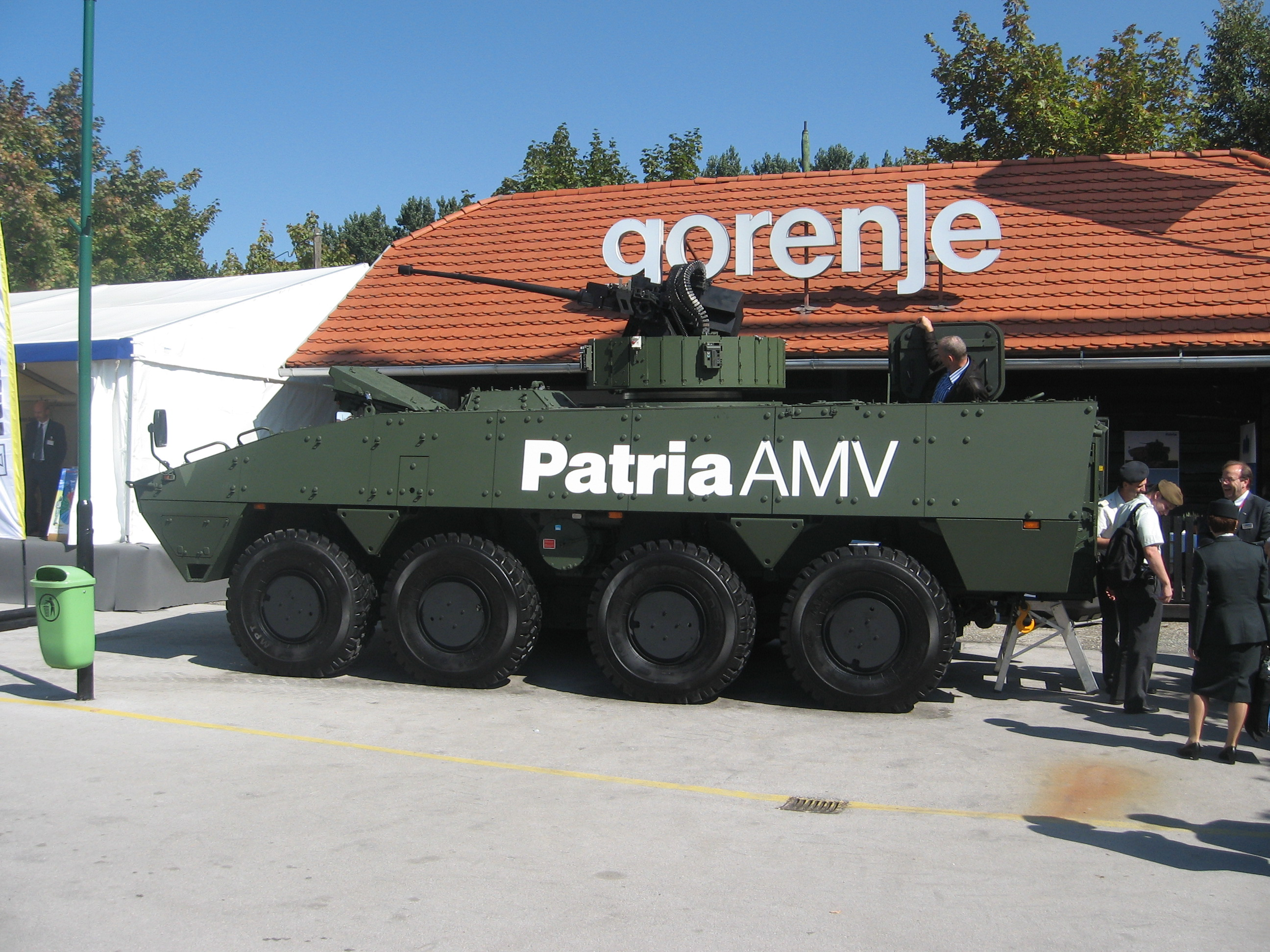 Patria AMV